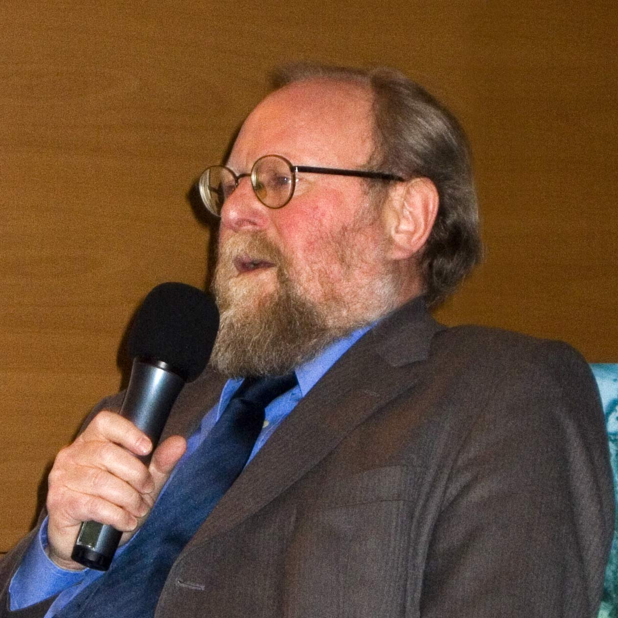 Wolfgang Thierse , Vizepräsident des Deutschen Bundestags auf einer Veranstaltung in Berlin 2008